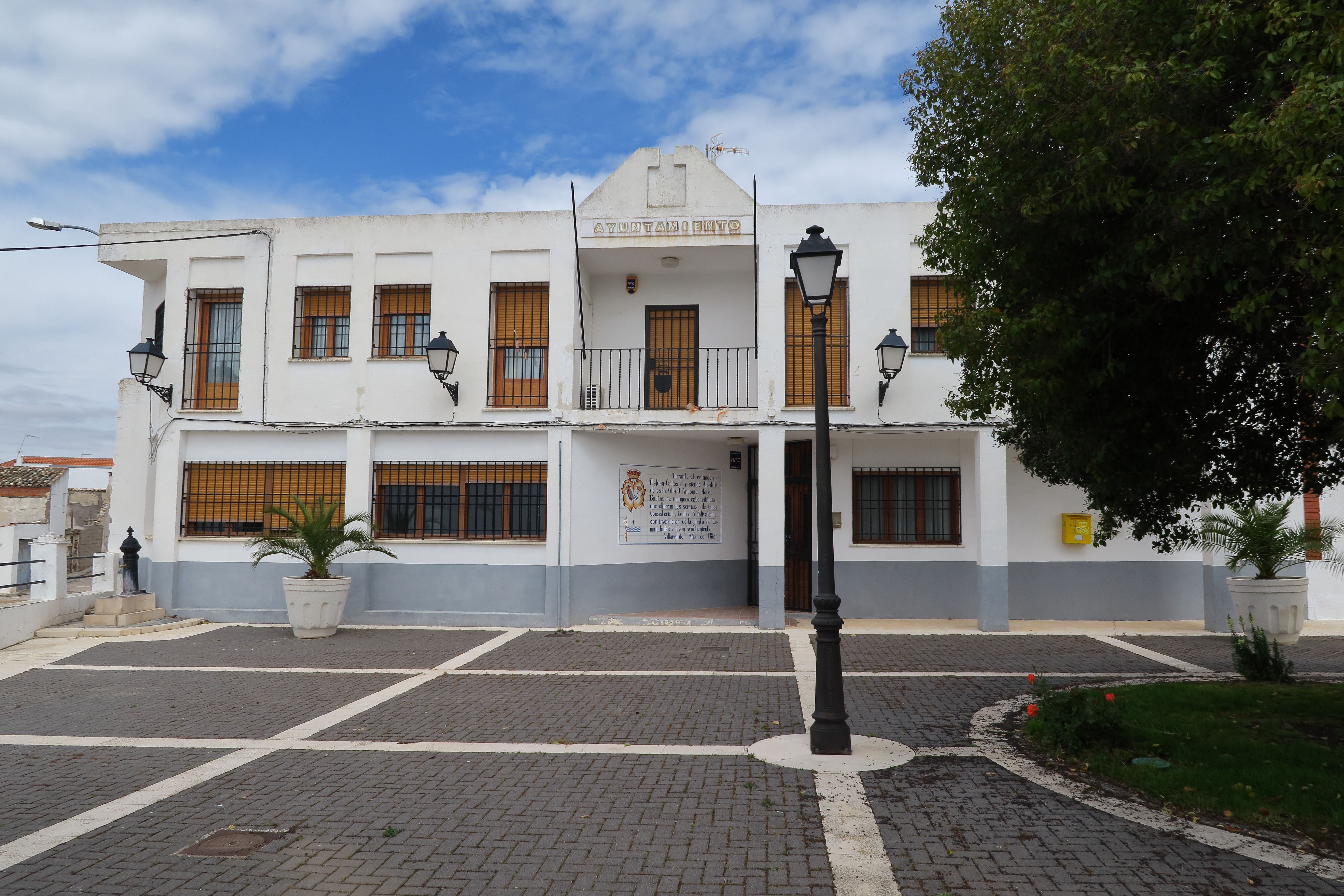 Villarrubio, Ayuntamiento